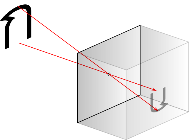 ภาพแสดงหลัีกการทำงานของกล้องรูเข็ม